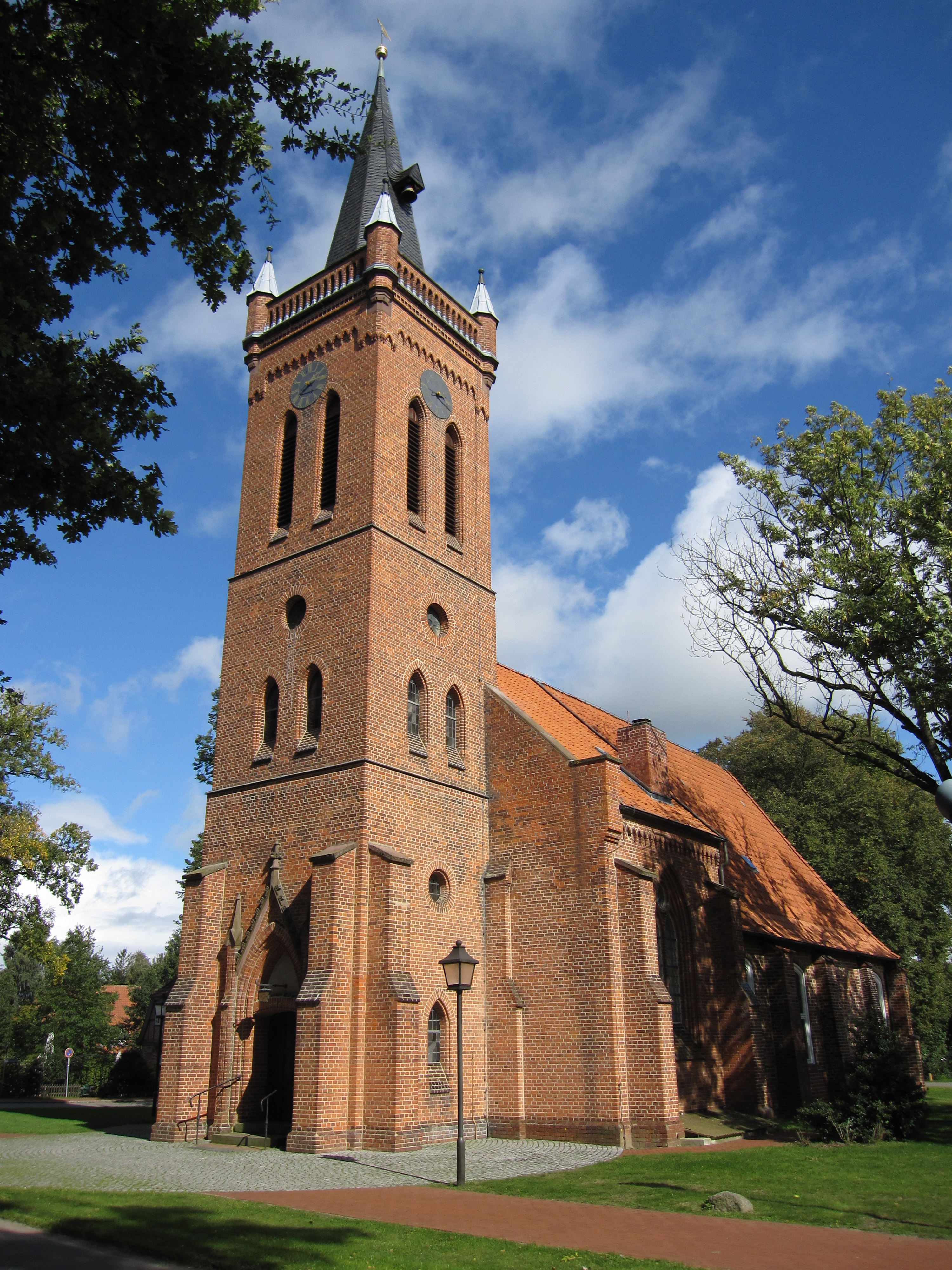 Die Peter und Paul Kirche in Lüdersburg von der Hauptstraße aus gesehen.